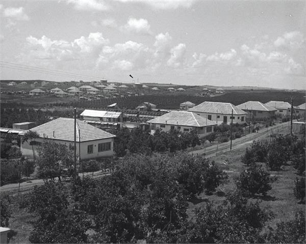 רמות השבים.